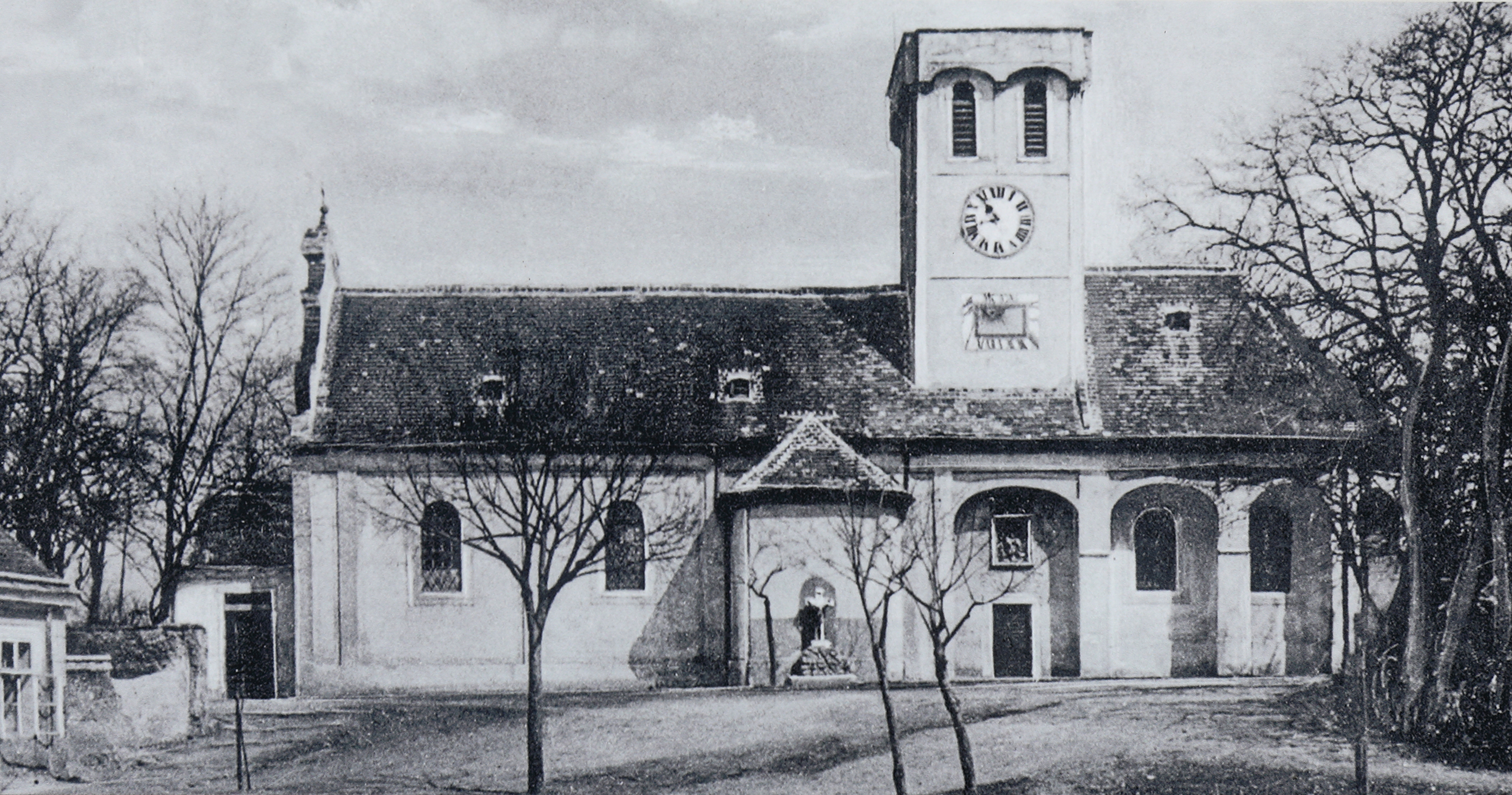 Die alte röm.-kath. Pfarrkirche hl. Johannes der Täufer um 1920 in der niederösterreichischen Stadt Deutsch-Wagram. Ab Mai 1956 wurde linksseitig des Turmes die alte Pfarrkirche abgerissen und rechtwinkelig dazu die neue Pfarrkirche nach einem Entwurf des Architekten Hans Petermair angebaut und am 21. Juni 1958 geweiht.